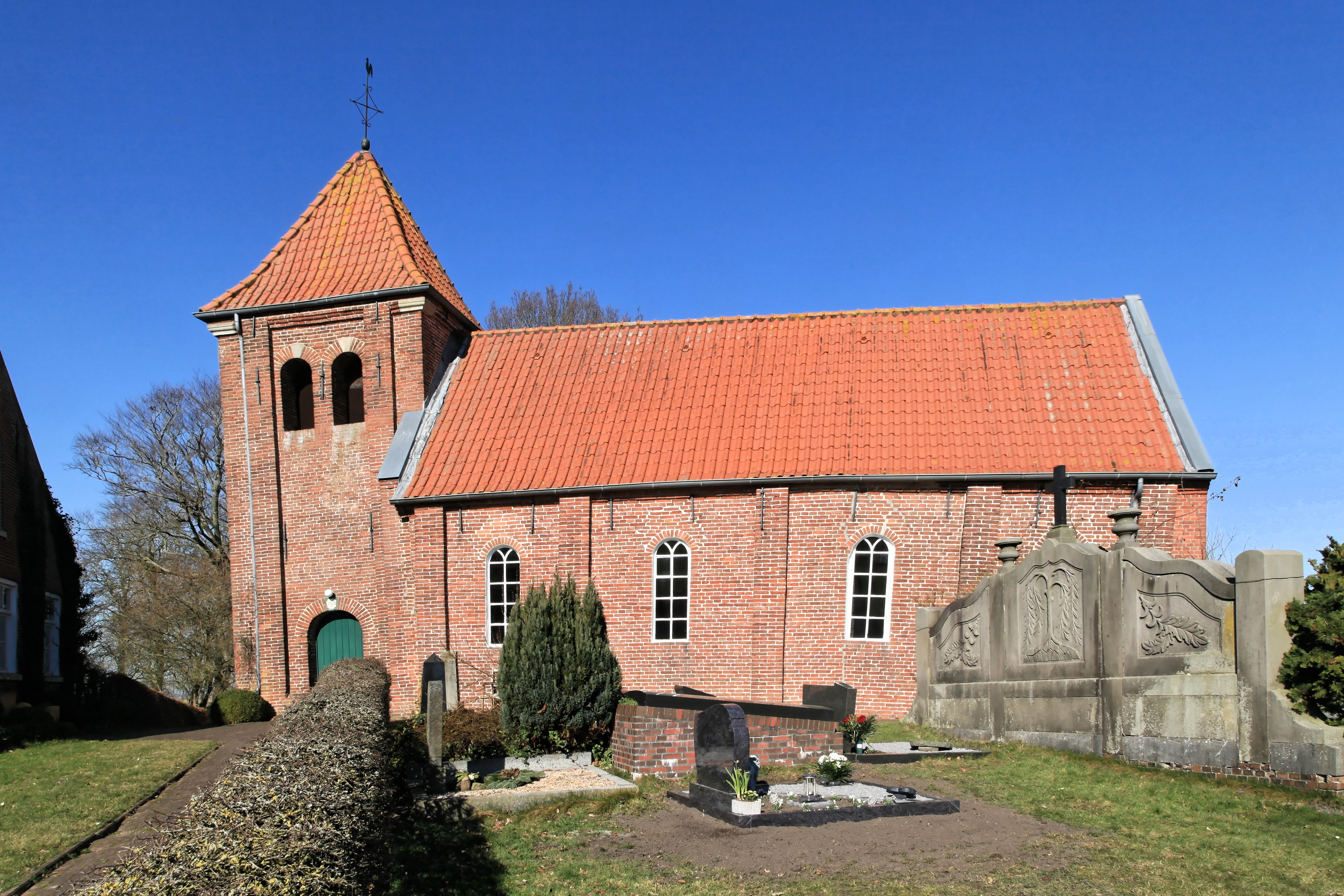 Friedhof und St.-Maria-Kirche in Marienchor, Jemgum